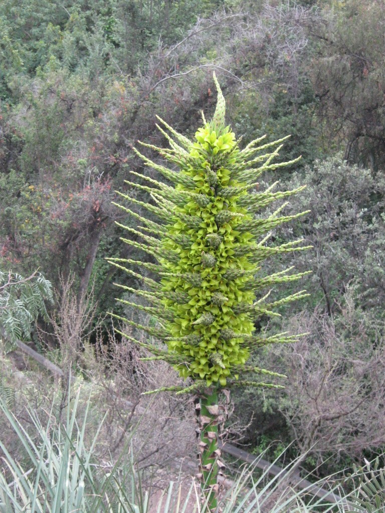 Puya chilensis Molina, escapo floral. Chile Mediterráneo